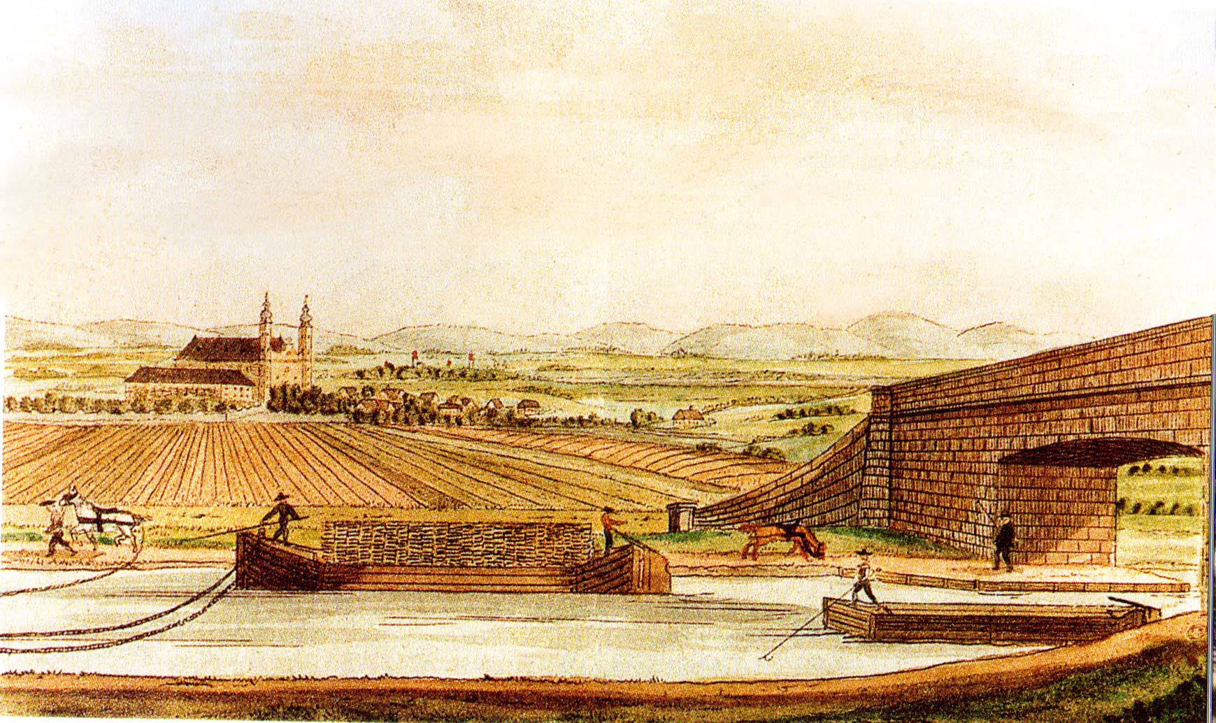 Schiffsmanöver auf dem Wiener Neustädter Kanal um 1820 (?)